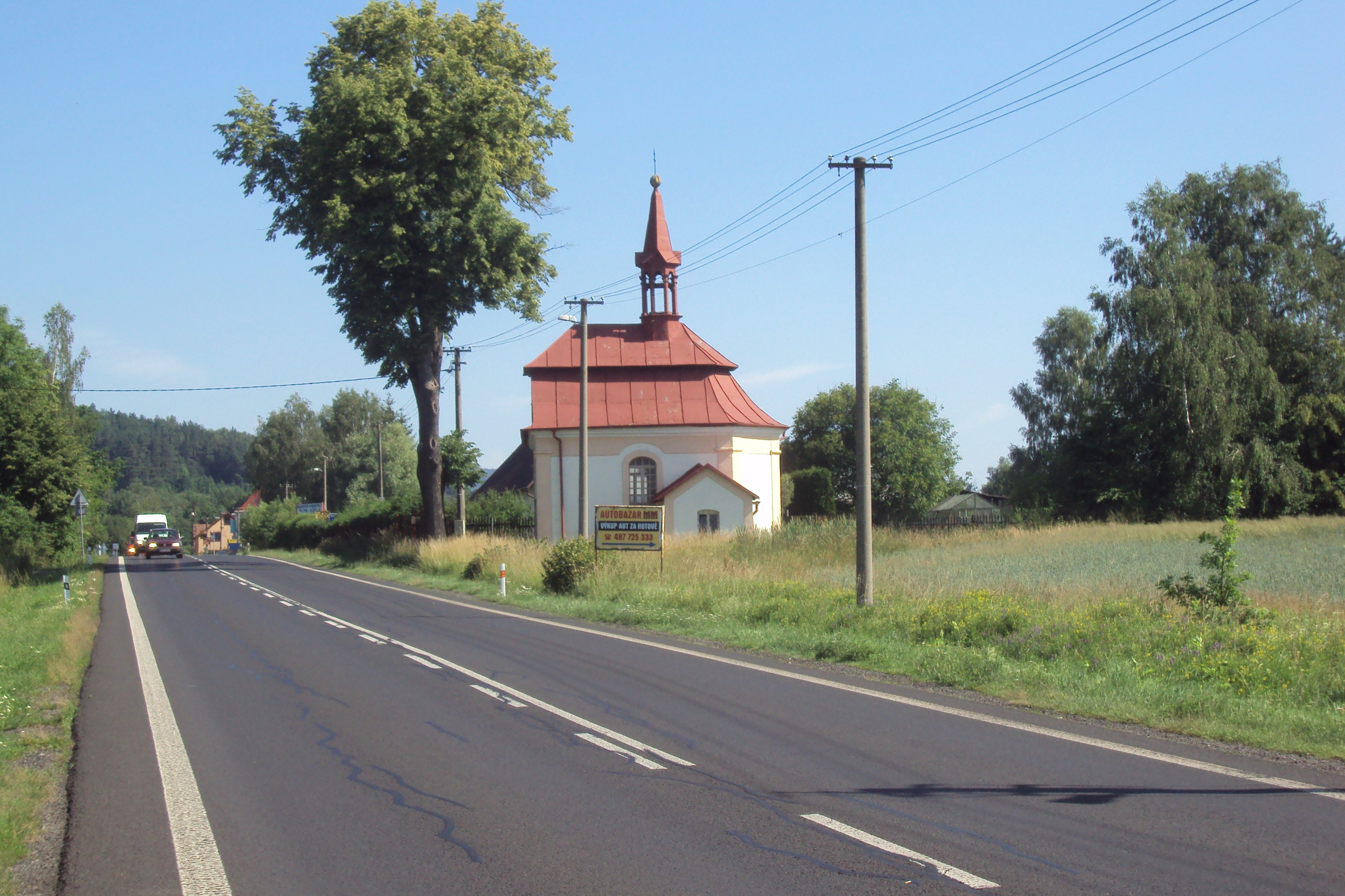 Kaple je u silnice I/9 v Pihelu, asi horním